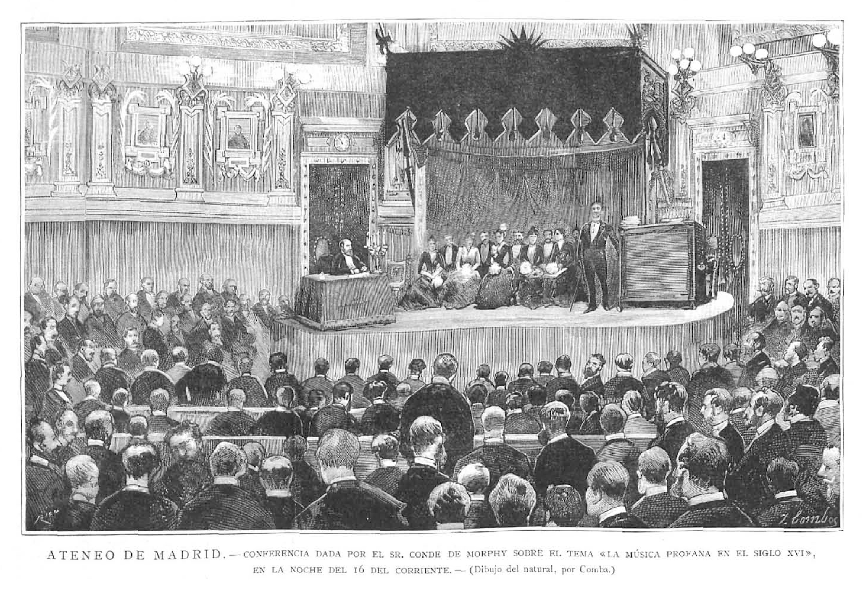 Ateneo de Madrid. Conferencia dada por el conde de Morphy sobre el tema "La música profana en el siglo XVI" en la noche del 16 del corriente.